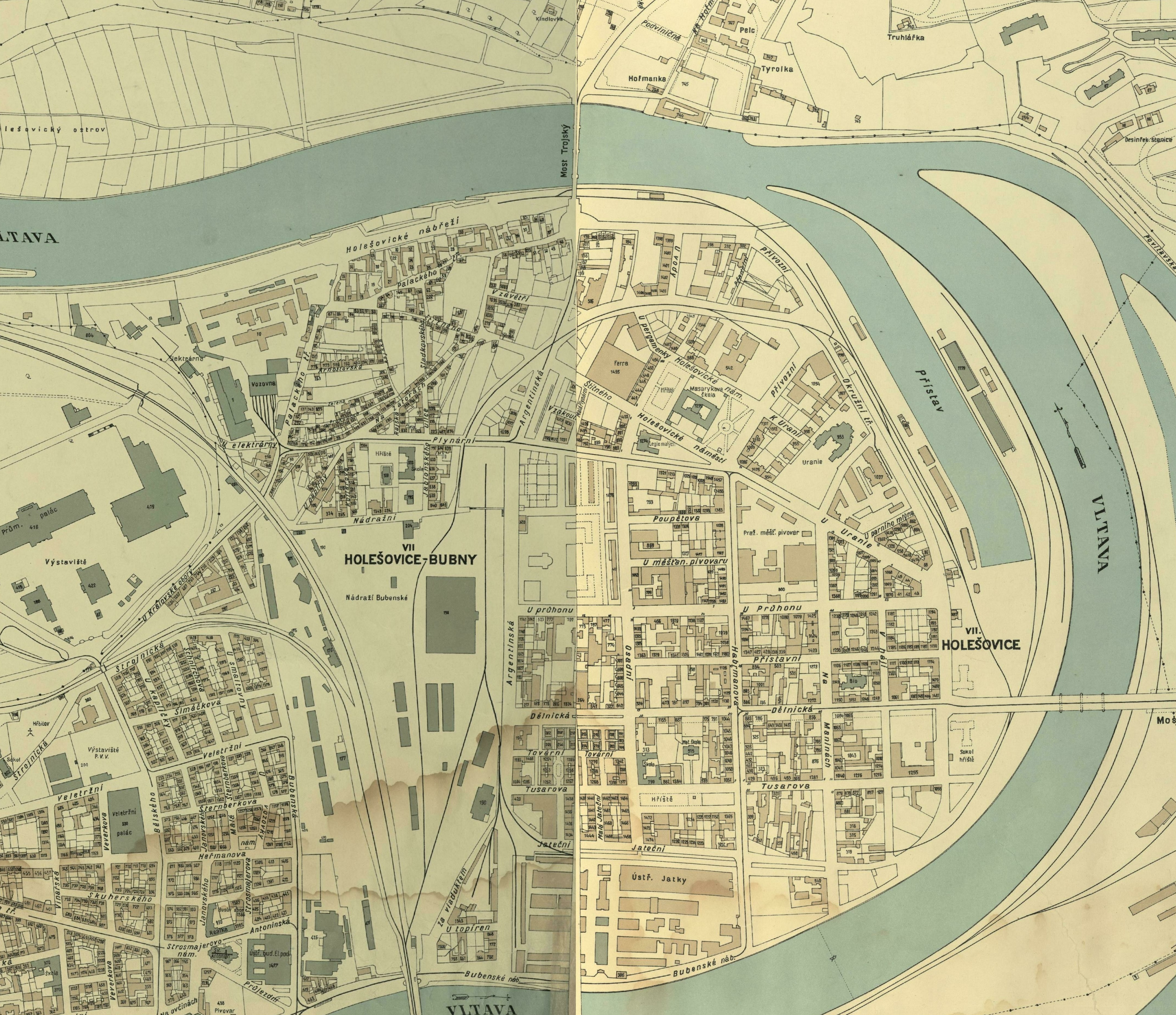 Holešovice v roce 1938, výřez z mapových listů č. 30 a 31, Orientační plán hlavního města Prahy s okolím (1938), nákladem Obce pražské, provedl stavební úřad hl. m. Prahy.